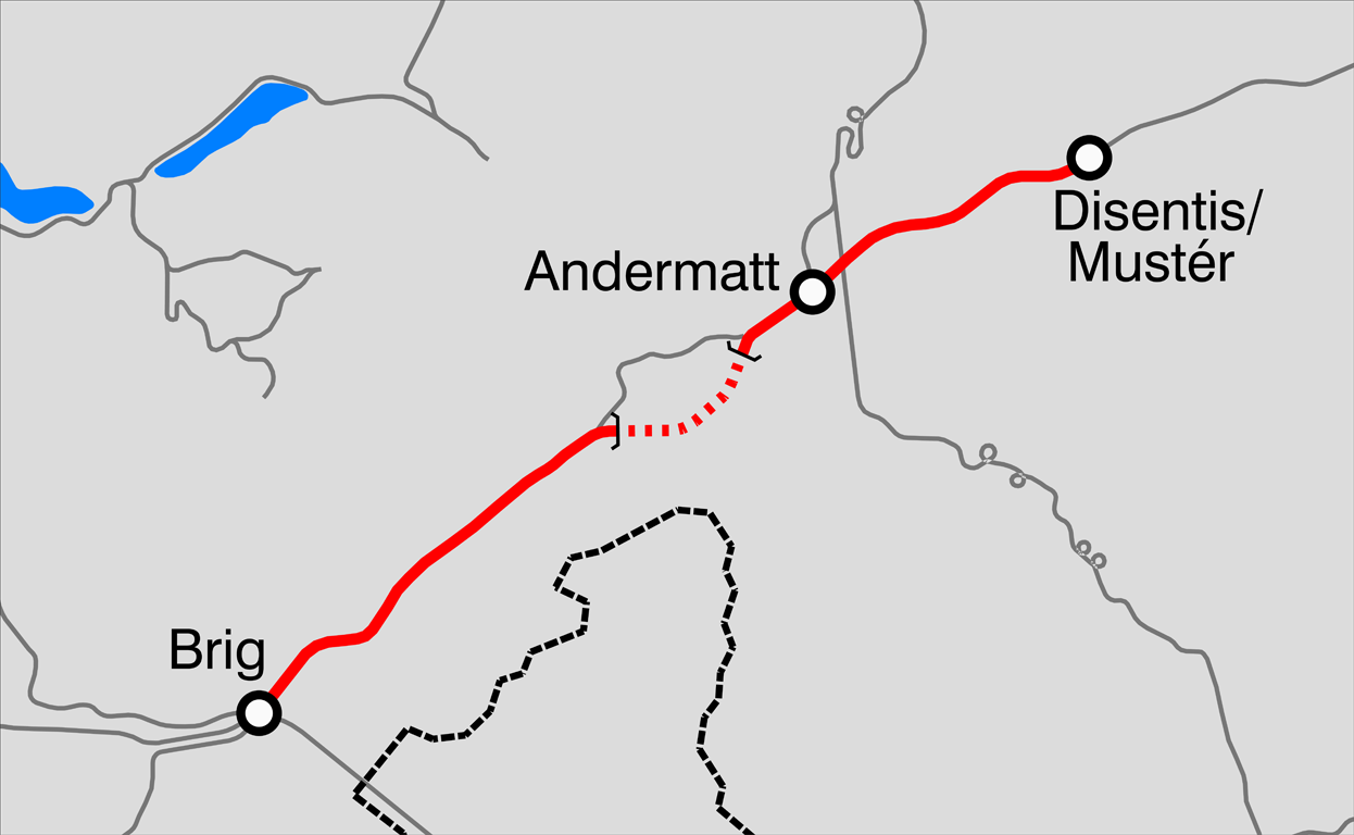 Karte der Furka-Oberalp-Bahn